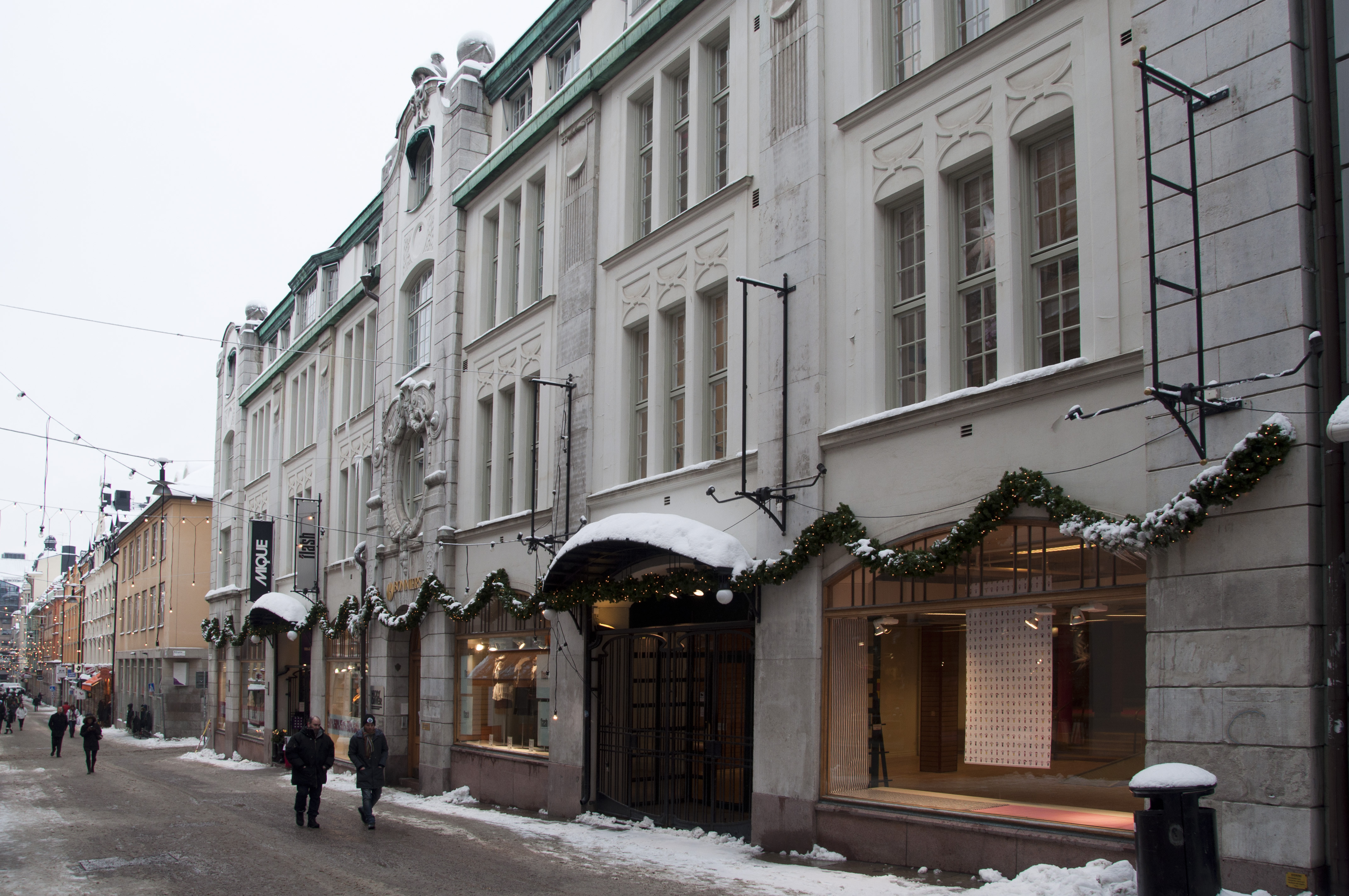 Gamla Brogatan 26. 1907-09, arkitekter Ullrich och Hallquisth , byggherre Ivar Haeggströms boktryckeri AB., byggmästare N Lundberg.